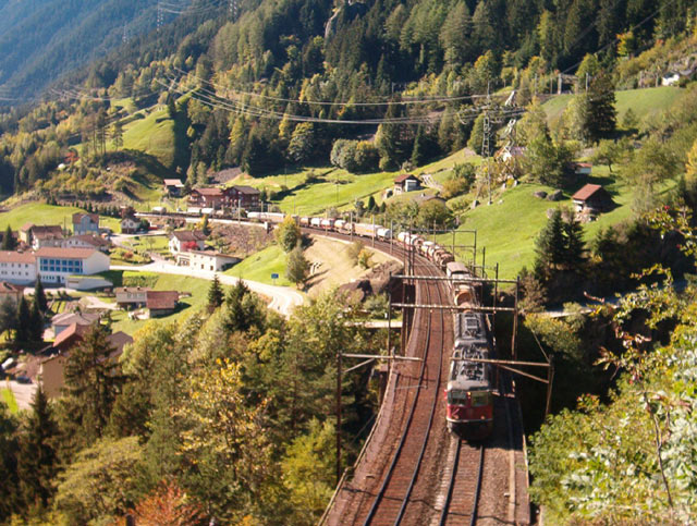 Nordrampe